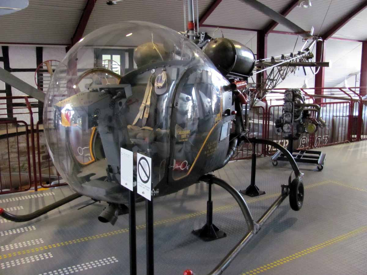 Bell 47, aufgenommen im Hubschraubermuseum Bückeburg